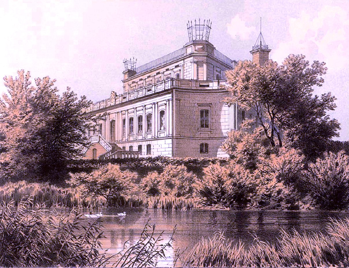 Schloss Luschwitz, Kreis Fraustadt, Provinz Posen